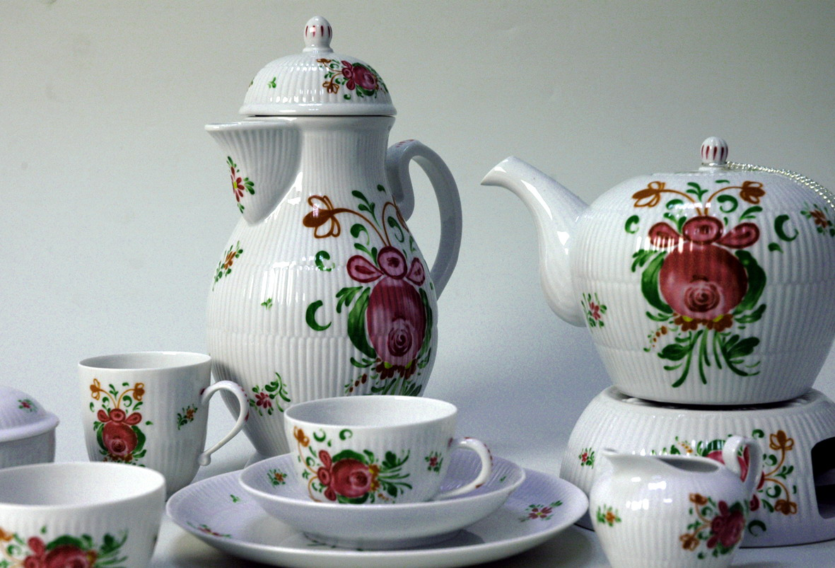 Porzellan Service Dekor Ostfriesische Rose, Wallendorfer Porzellan Manufaktur, Autor: Constanze Ritze, Gilitzer Porzellan Manufaktur Bildarchiv: Gilitzer Porzellan Manufaktur GmbH